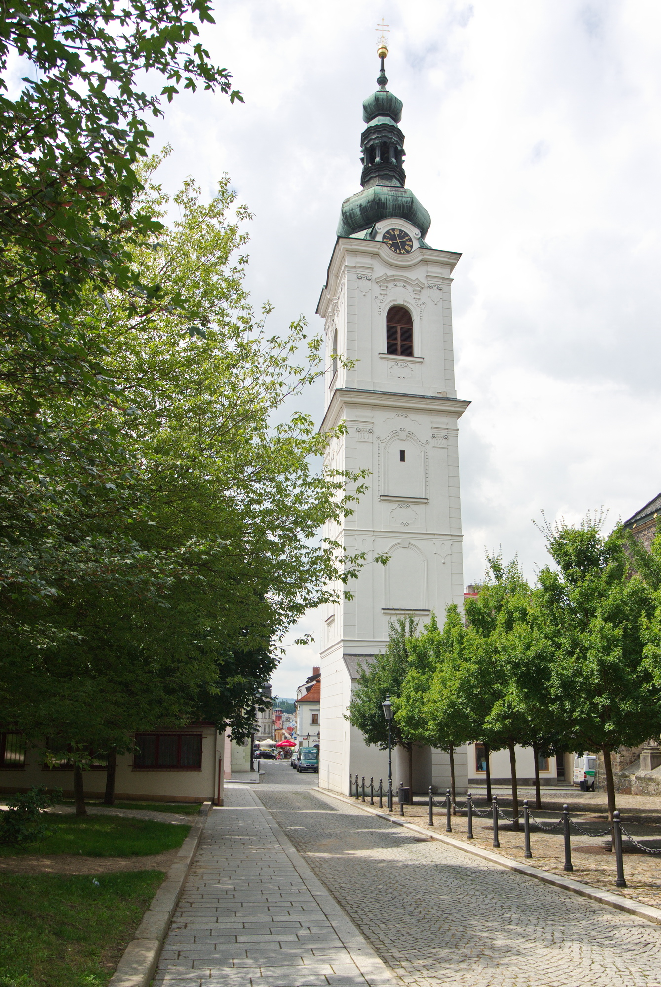 Bílá věž, Krameriova, Klatovy I, Klatovy.